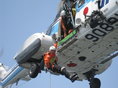 横須賀市大津湾海上で行われた訓練において、横須賀海上保安部所属の巡視艇「すがなみ」の上空でホバリングする羽田航空基地所属のヘリコプターから降下する特殊救難隊員。